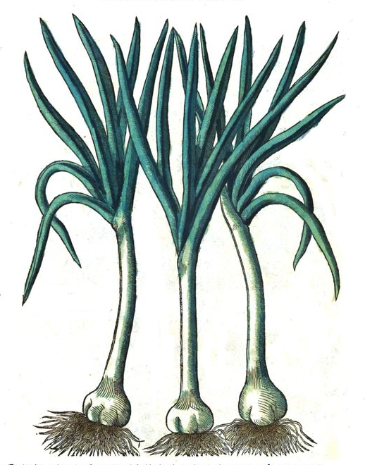 Dessin représentant 3 pieds d'ail rocambole publié dans un livre de botanique de 1583 à Venise